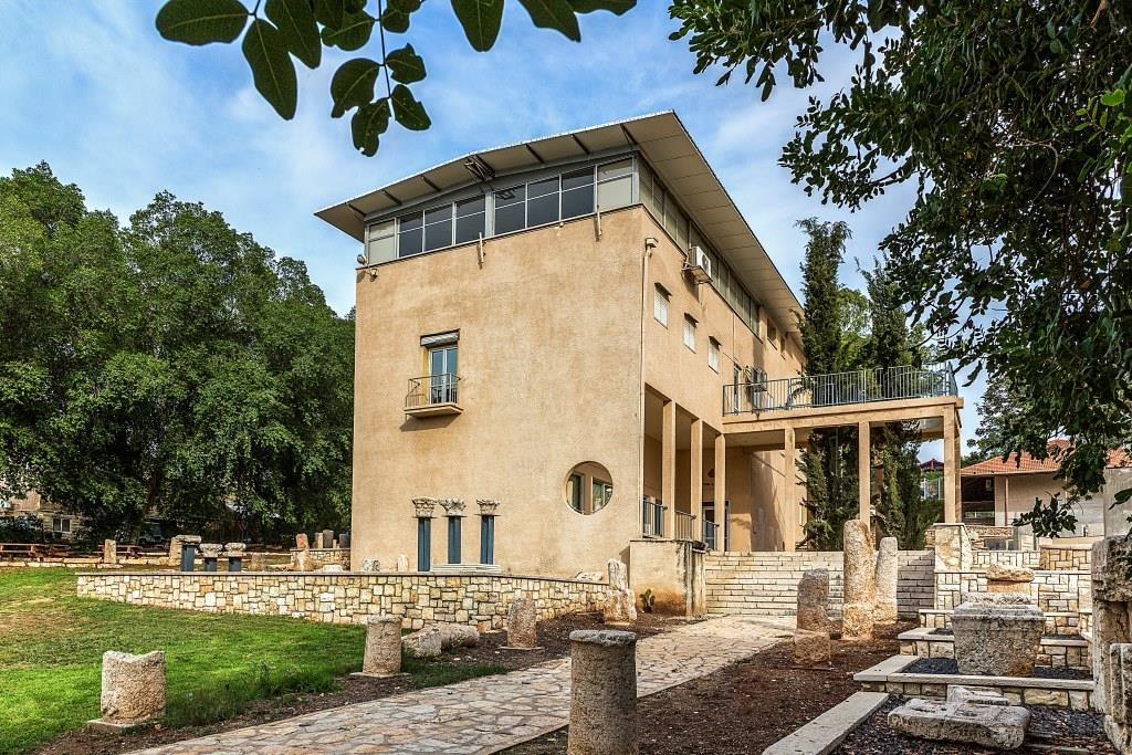 מבנה המוזאון מבחוץ